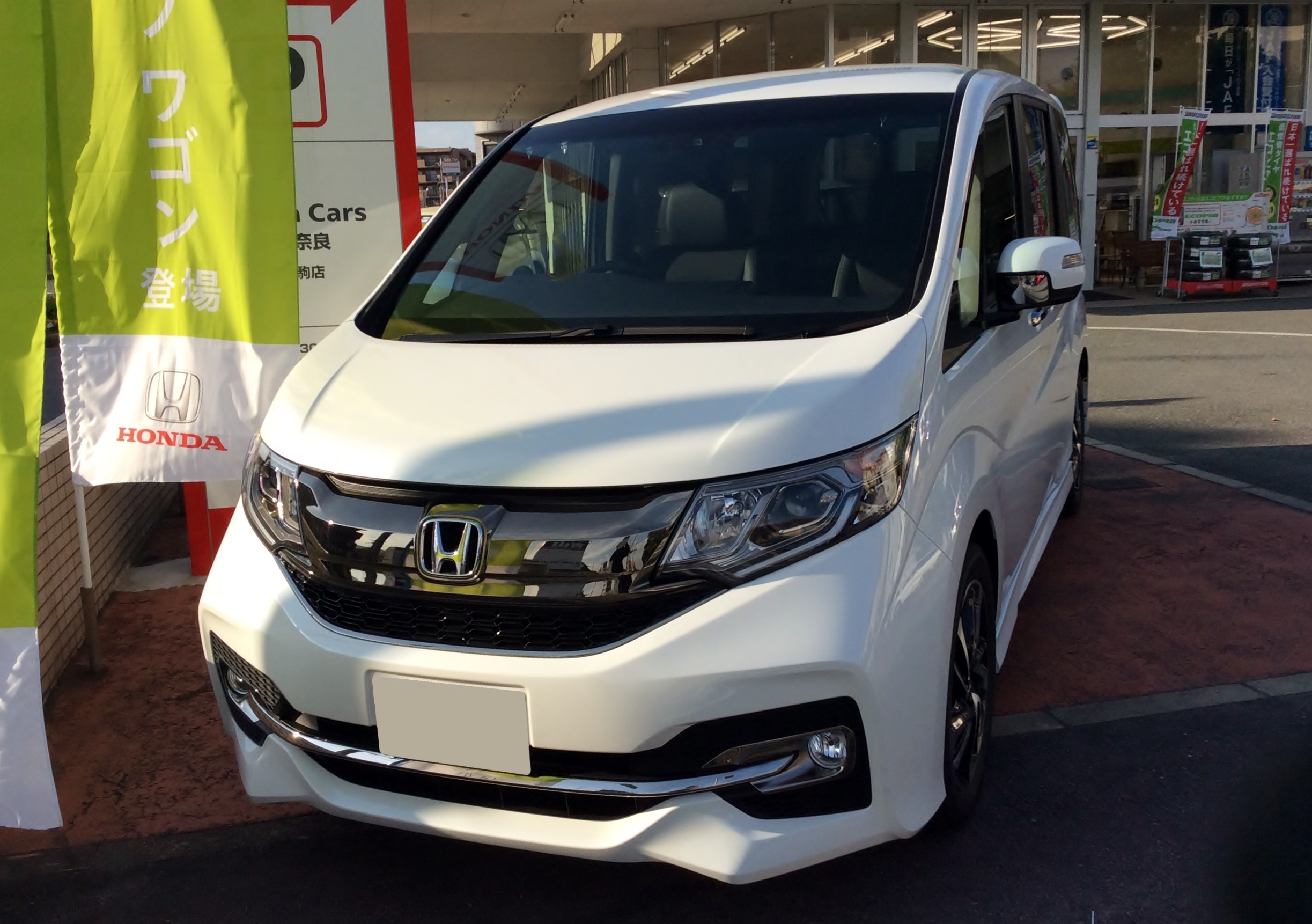 RP3型ホンダ・ステップワゴンスパーダクールスピリットをフロントから撮影。